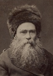 הרב יחזקאל סירקין אב"ד קאפוסט